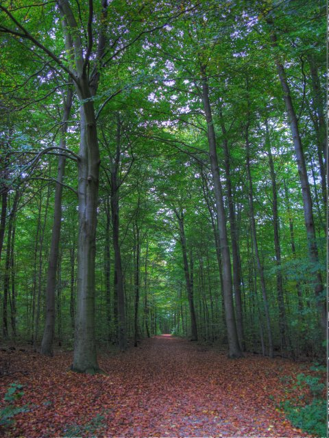 Hamburg - "Herbststimmung im Volksdorfer Wald"